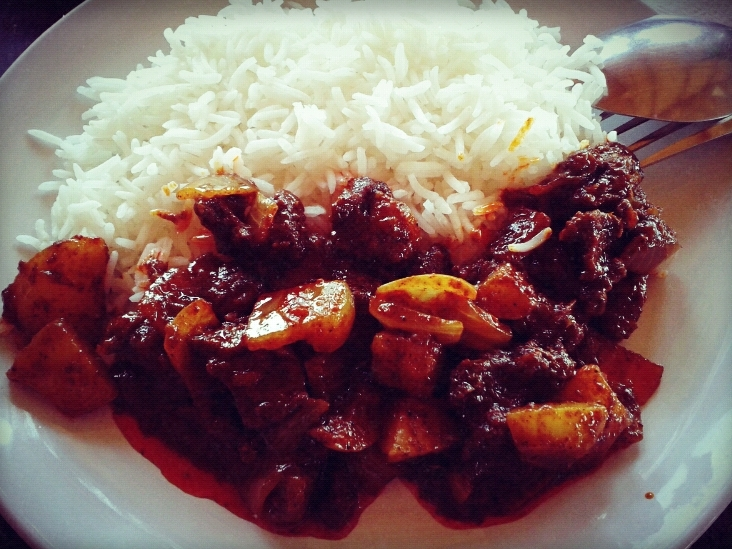 Chouriço goês frito, na praia de Baga, em Goa.